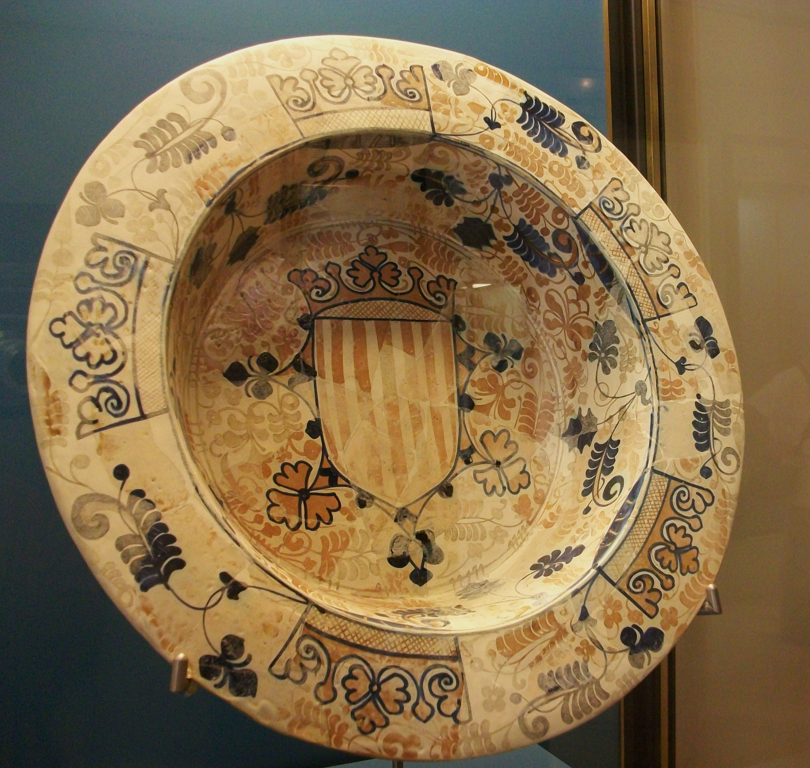 Plat braser amb heràldica del Regne de València, Manises segle XV, Museu de Ceràmica Gonzàlez Martí. Pisa blava i daurada, sèrie de falgueres i corones.